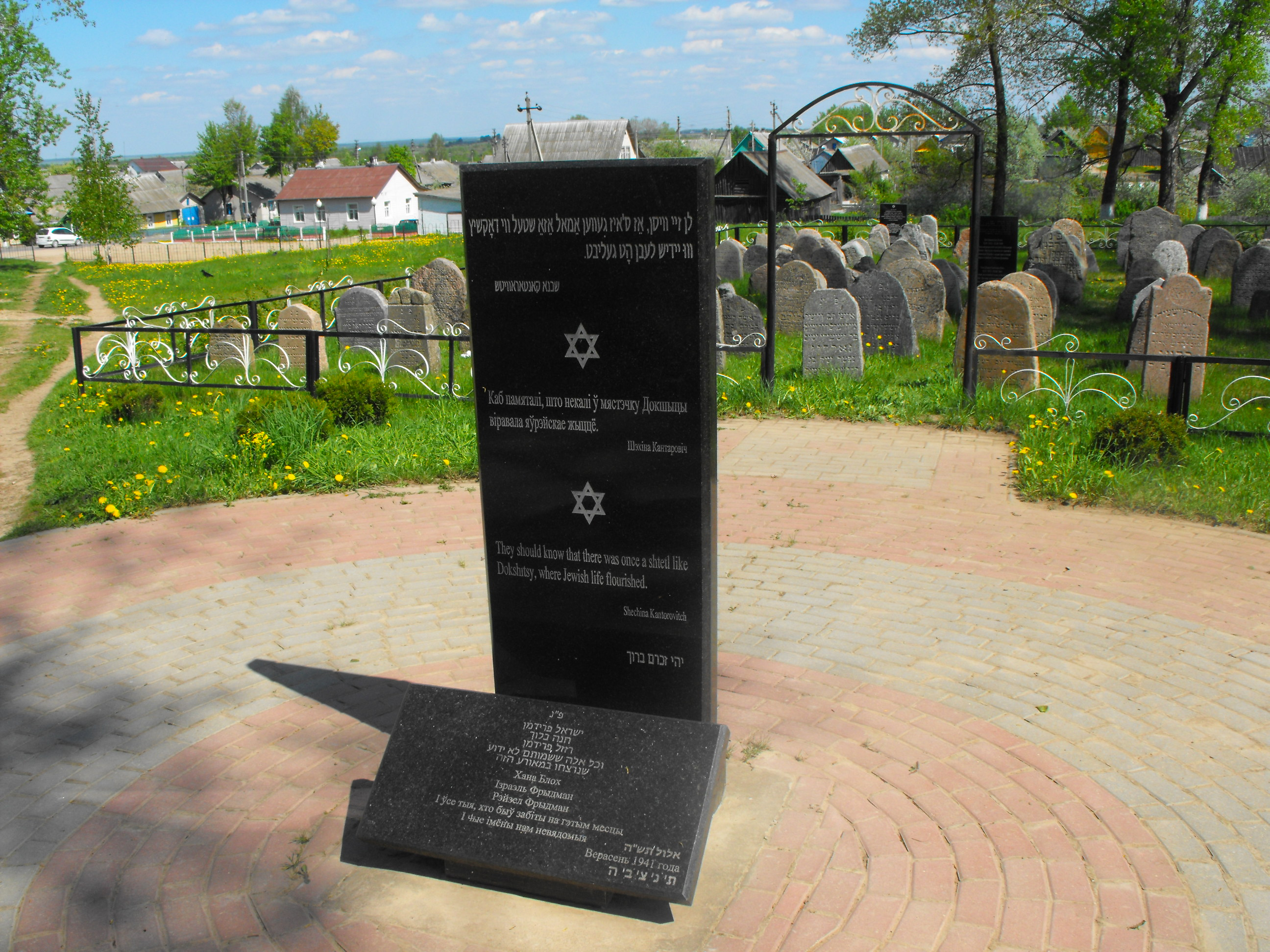 Мемориальное еврейское кладбище в Докшицах на улице Маяковского, созданное на месте ранее уничтоженного еврейского кладбища, ставшим одним из мест массовых убийств местных евреев нацистами во время Второй мировой войны. Прежде разбросанные надмогильные плиты были собраны на территории всего города, свезены и установлены на этом месте. Старое кладбище занимало всю территорию в пределах внешней ограды парка. Множество могильных плит осталось под землей и не были извлечены на поверхность.